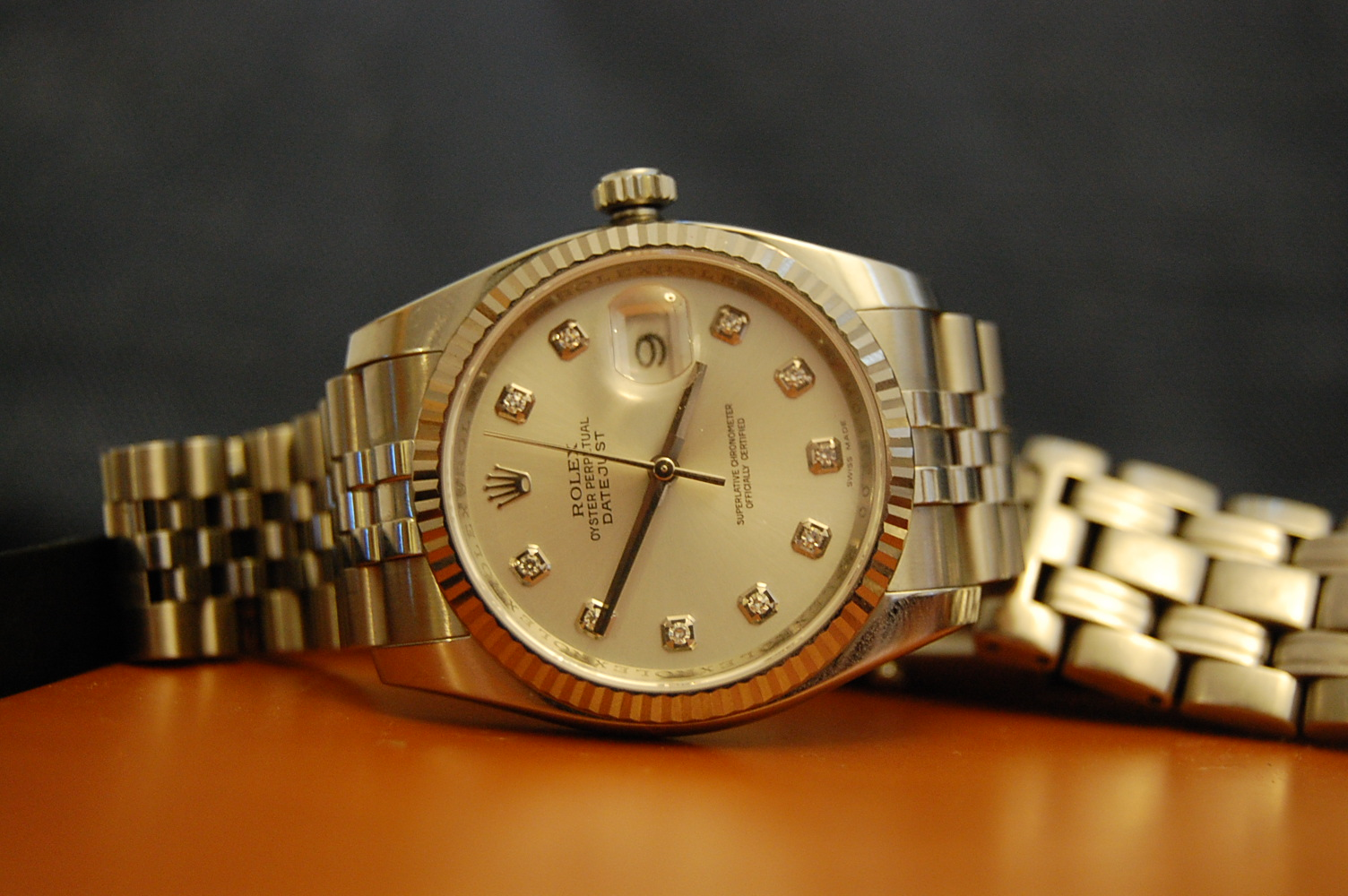 Rolex Datejust reference no. 116234